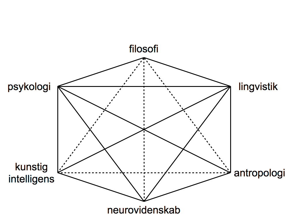 figur der beskriver de relationen mellem kognitionsvidenskabs akademiske underdiscipliner